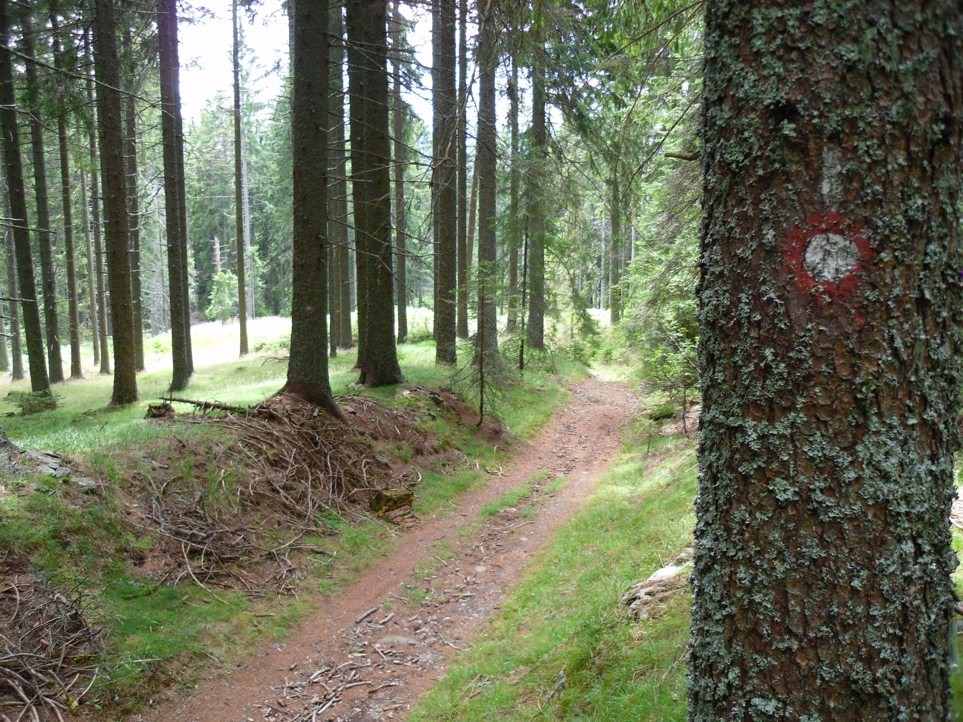 Na Košenjaku